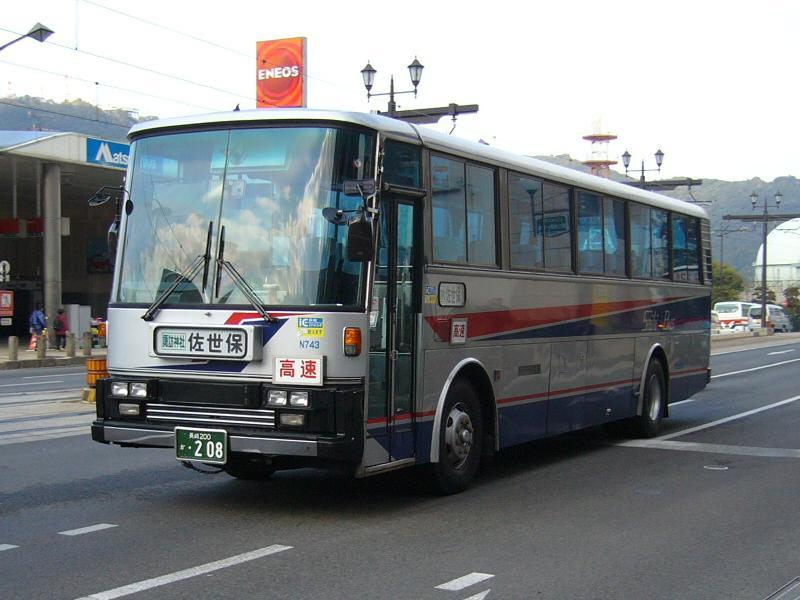 登録番号 長崎200か・208 西肥自動車所属 車番N743 長崎～ハウステンボス線用 2006年1月15日 長崎駅交通会館前にて撮影